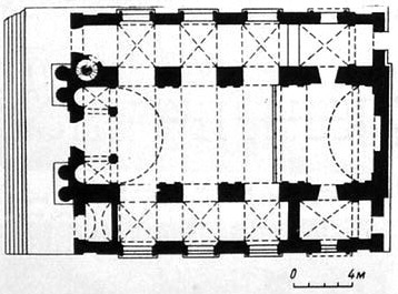 Zamiechów - kościół rzymskokatolicki pw. św. Jana Nepomucena, 1808-1820